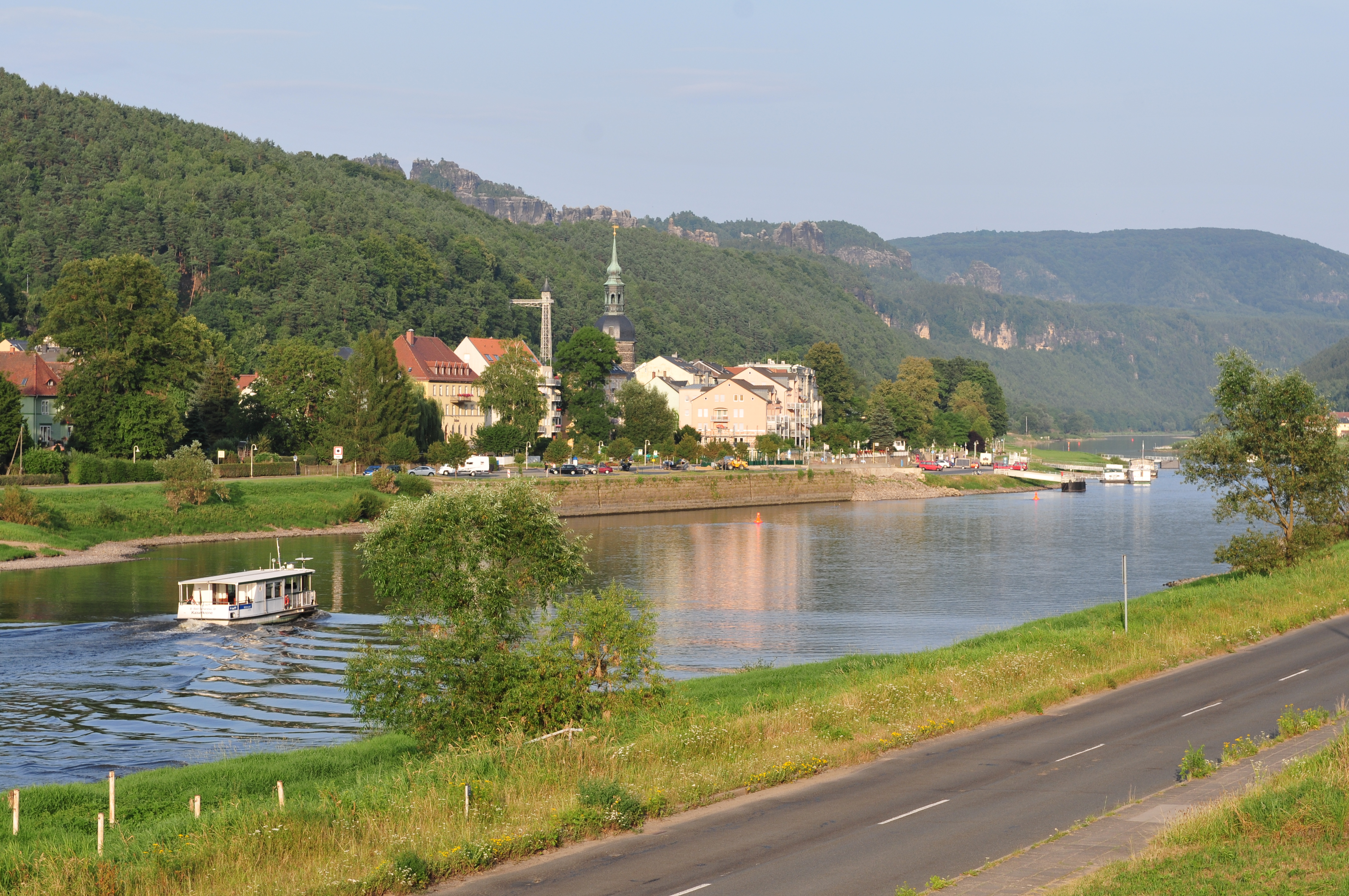 Bahnhof Bad Schandau